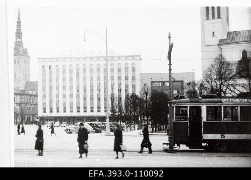 Трамвай, построенный на Таллинских Главных заводах Железной дороги (Таллин, площадь Свободы)